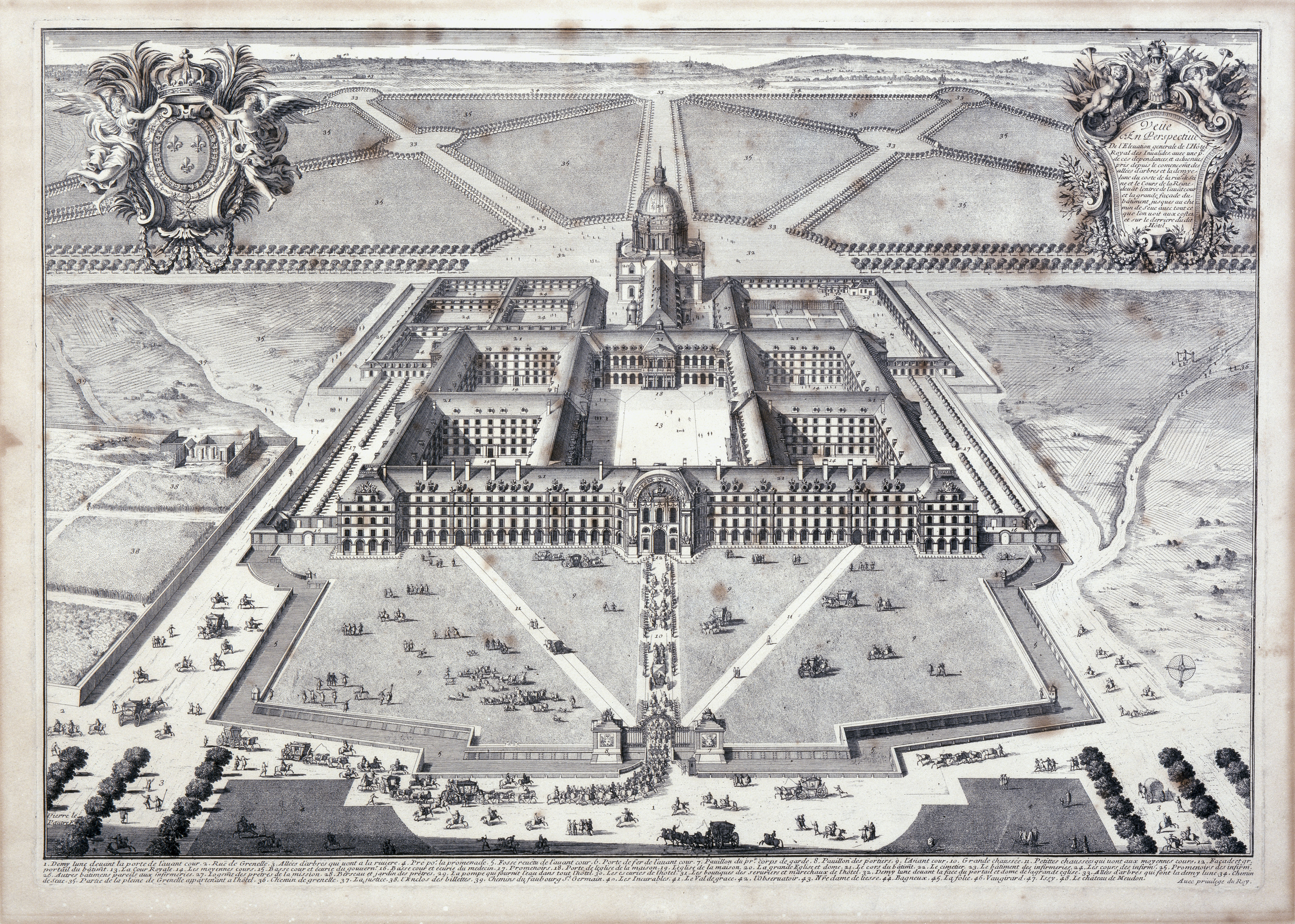 Pierre Lepautre, Vue en perspective de l'Hôtel royal des Invalides, vers 1680, eau-forte et burin, 0,402x0,557m©Paris, musée de l'Armée